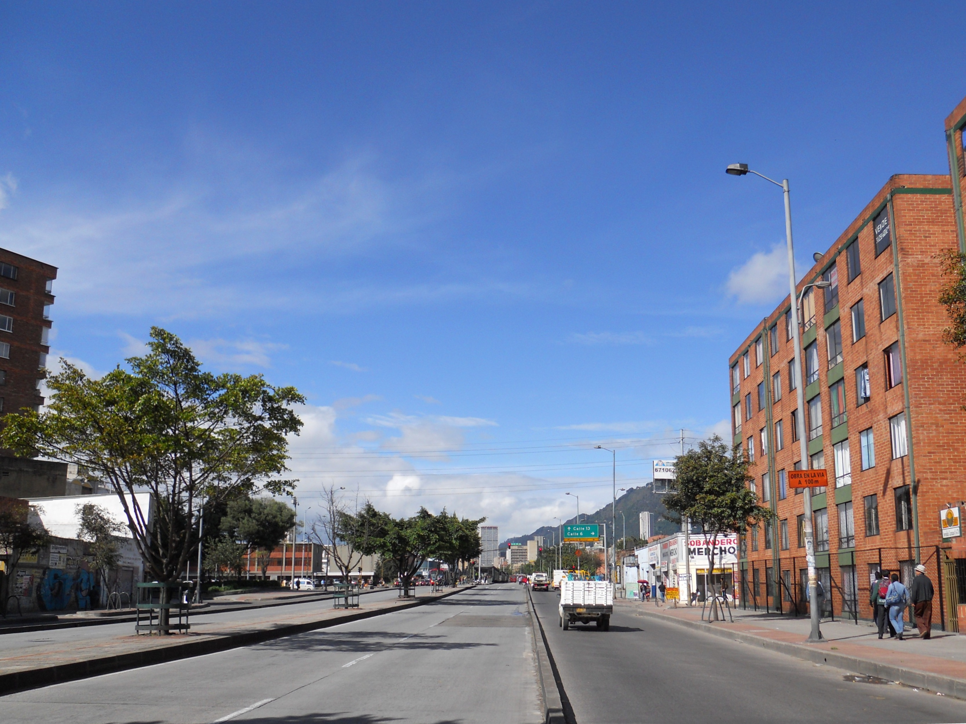 Avenida Caracas hacia la calle 4 Campo David Bogotá bis. Límite entre las localidades de Santa Fe y de Los Mártires.